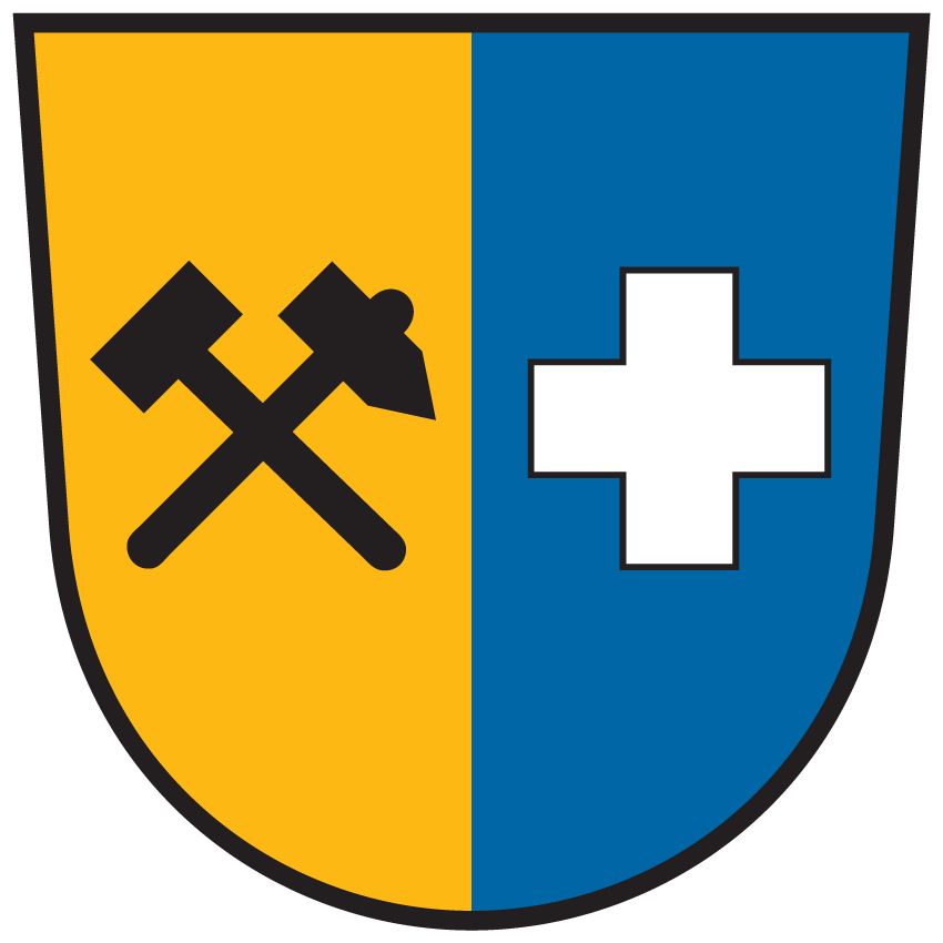 Wappen von Glitschtal